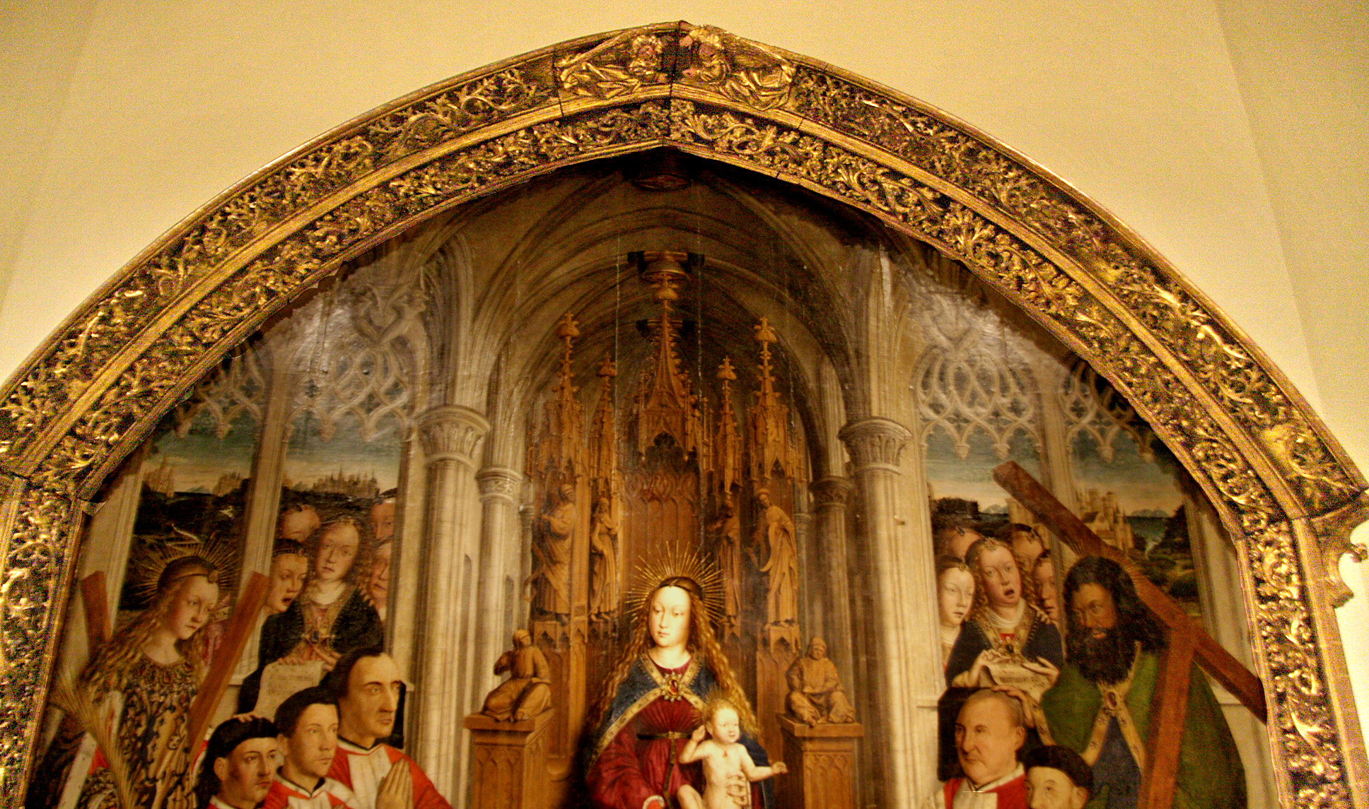 Detall del guardapols amb un treball de traceria en fusta daurada.